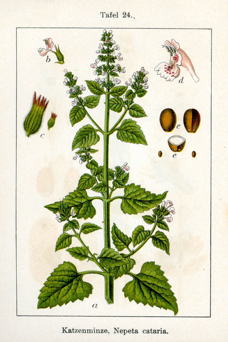 Nepeta cataria L. Original Description Katzenminze, Nepeta cataria